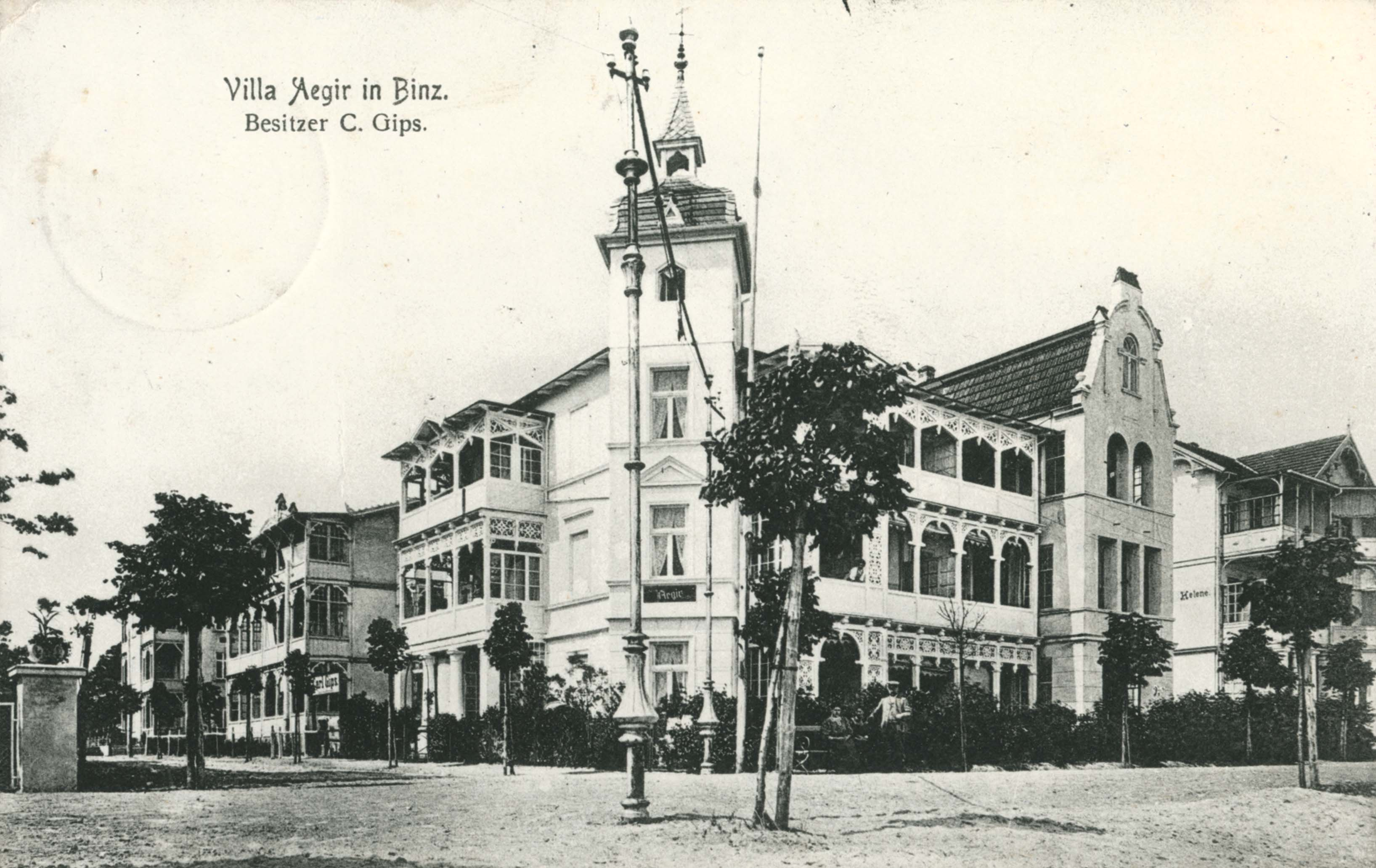 Diese Postkarte wurde im Jahre 1937 als Urlaubsgruß verschickt. Tatsächlich stammt die Karte aus der Mitte der 1920er Jahre. Die prägnante „Villa Aegir“ steht hier im Mittelpunkt. Rechts schließt sich die „Villa Helene“ an, links die „Nymphe“. Die Häuser gehörten zeitweise einem Herrn Carl Gips, der in Binz über einigen Grundbesitz verfügte. Der große Pfosten im Vordergrund diente der elektrischen Beleuchtung der Strandpromenade.